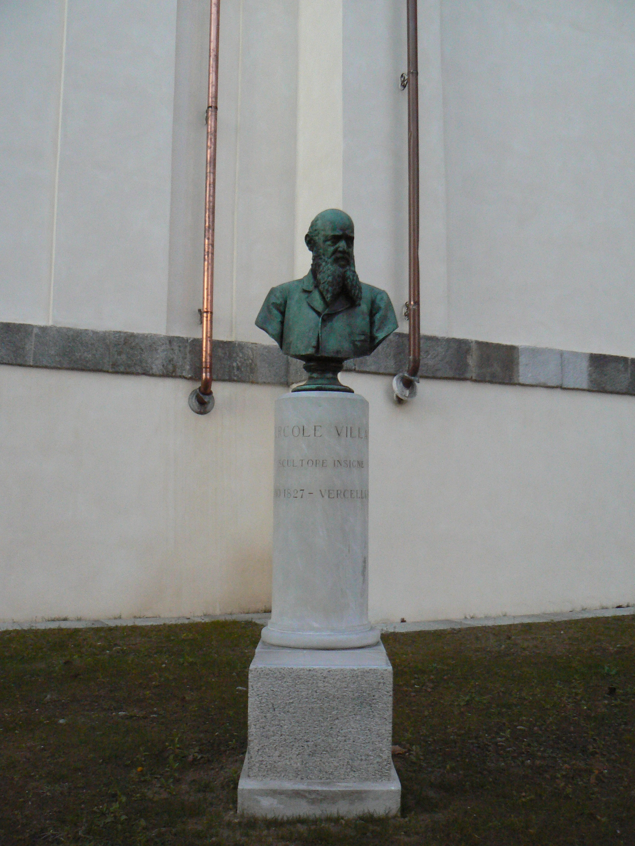 Busto lungo il fuanco della cattedrale di Sant'Eusebio, Vercelli.